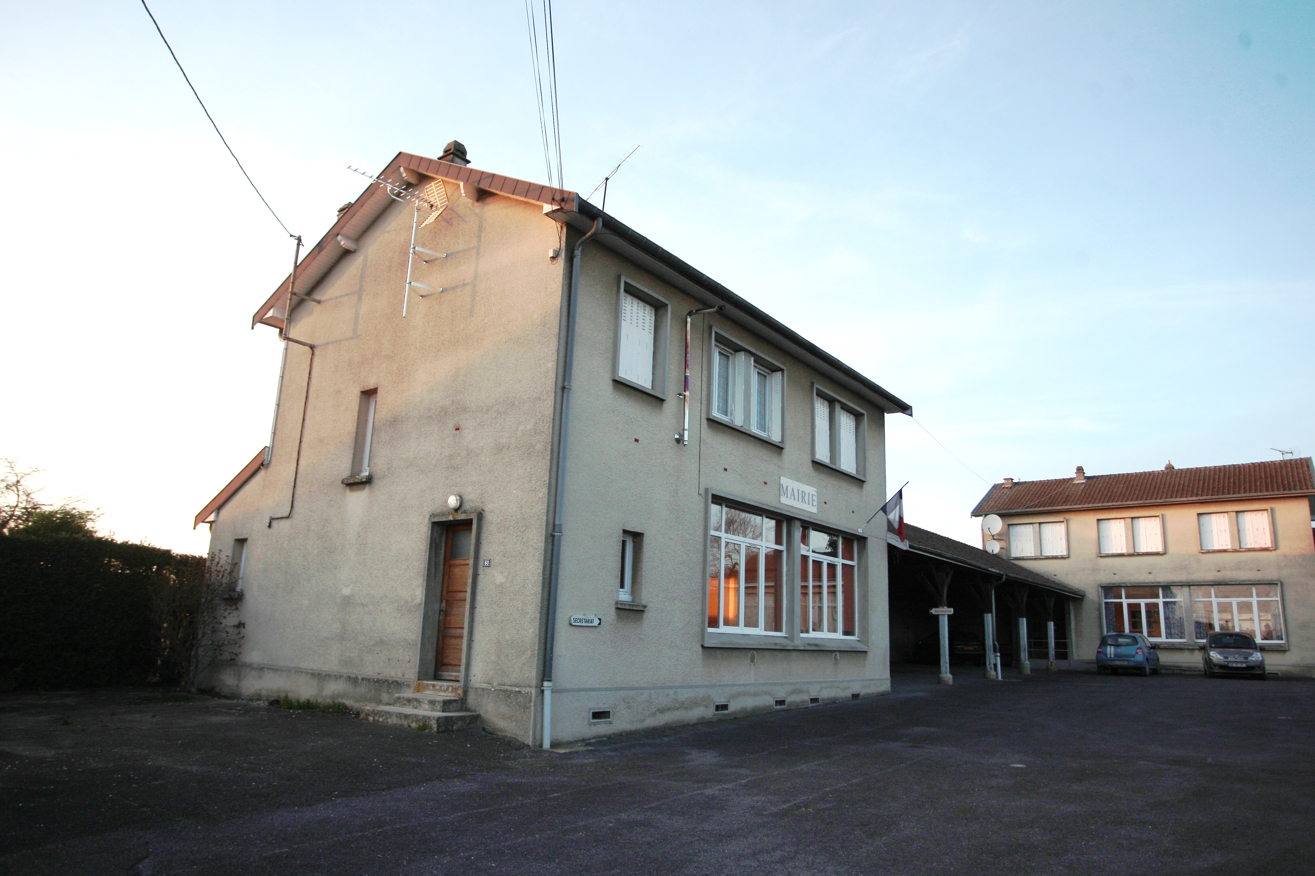 Village Ardennais